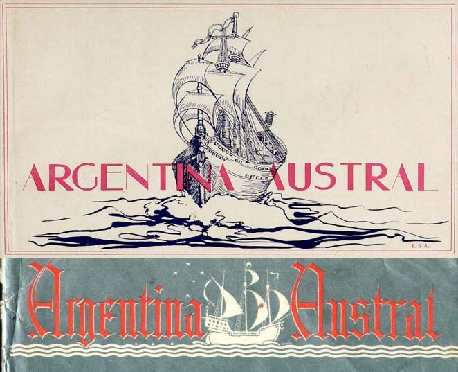 Logo de la revista Argentina Austral